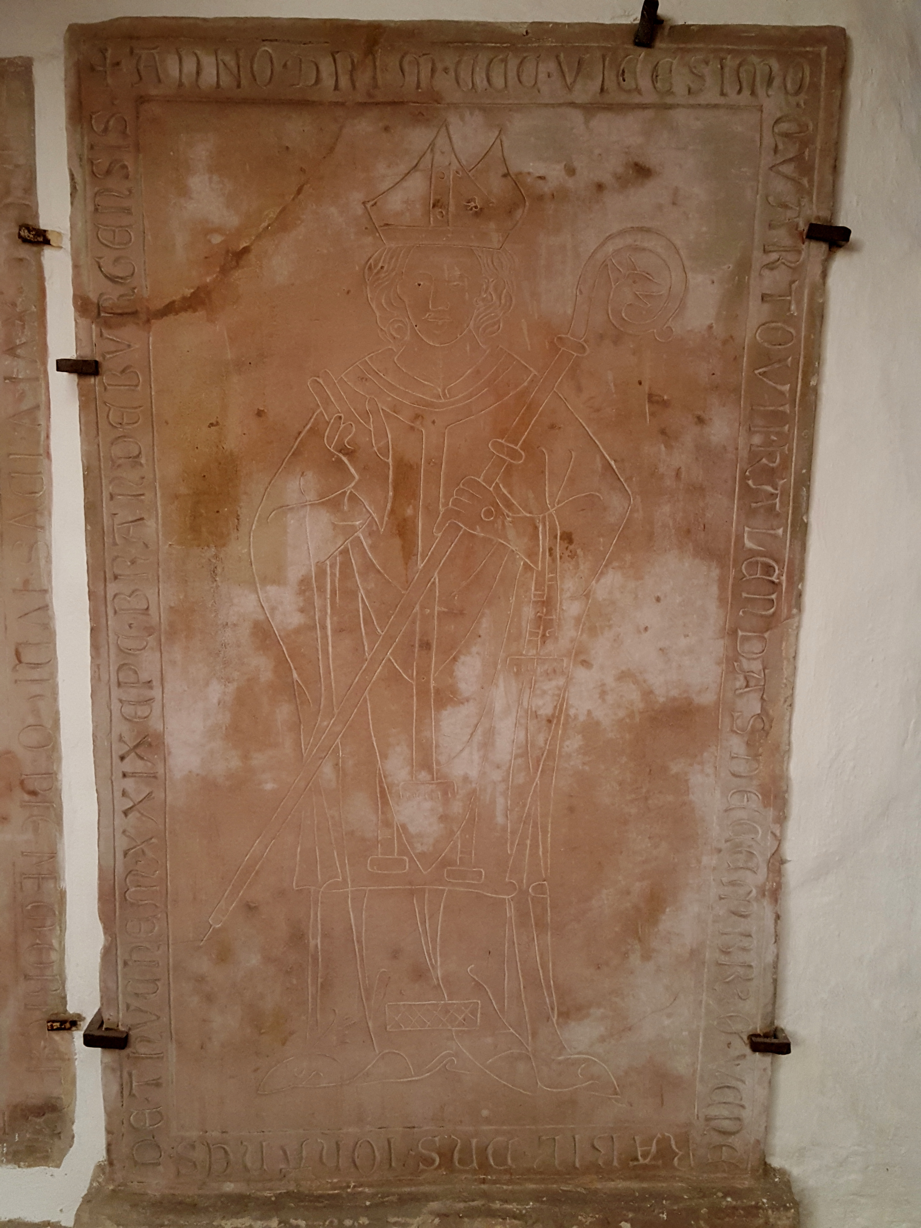 Johannes von Thuchem, Grabplatte im Dom zu Brandenburg, Künstler unbekannt